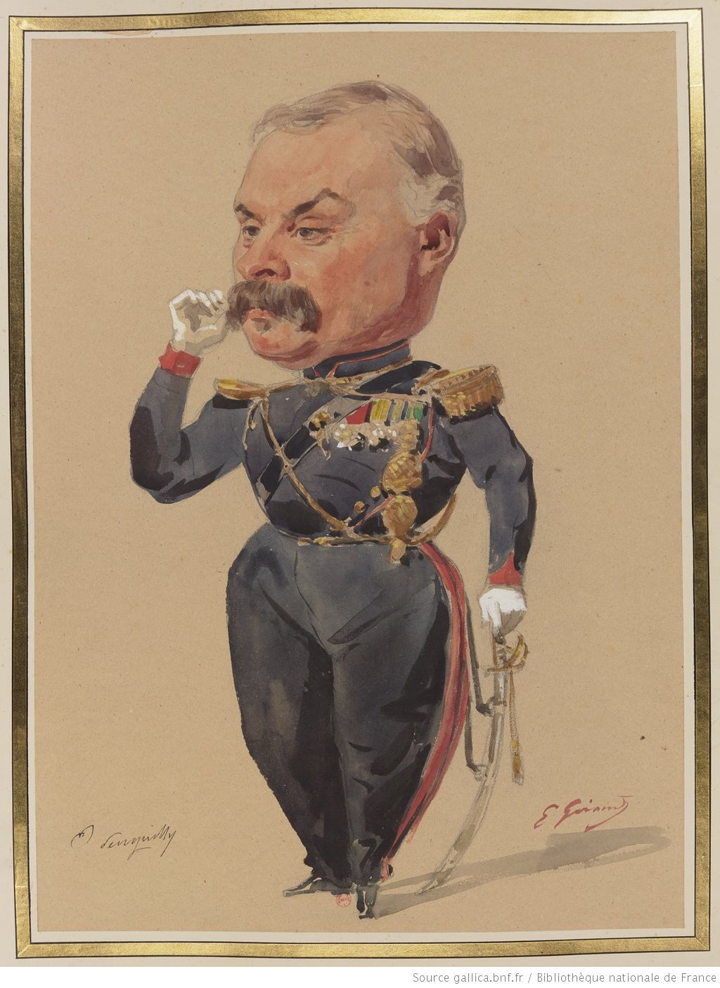 Le peintre et conservateur du Musée d'artillerie, Octave Penguilly L'Haridon, aux Soirées du Louvre. 1866. Dessin d'Eugène Giraud.